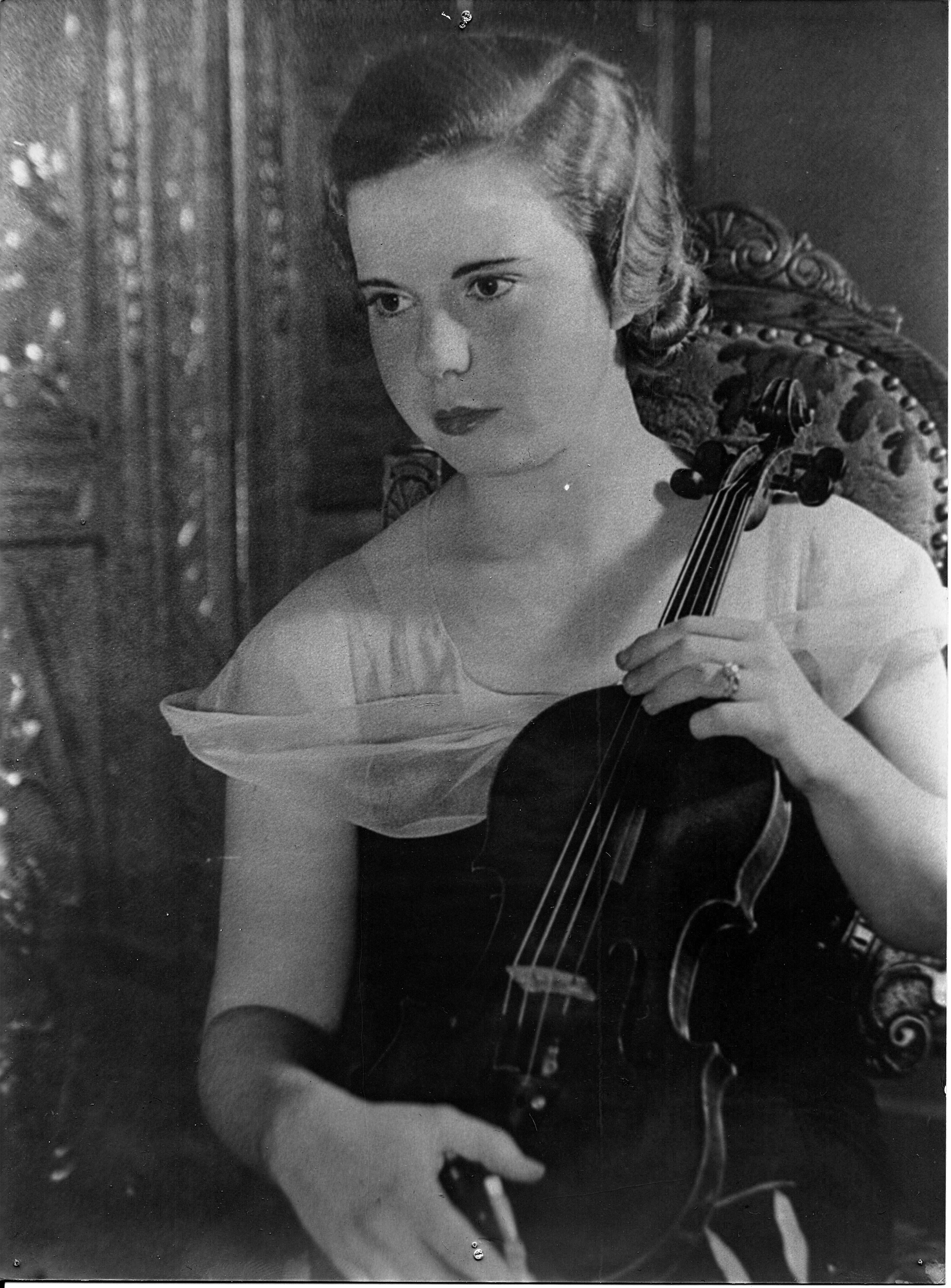 Yvonne Lephay en 1934